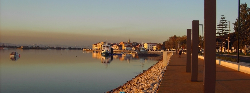 Vista do Rio Judeu a partir do passeio ribeirinho do Seixal